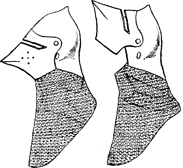 Бацынет з заслонай "сабачая пыса".